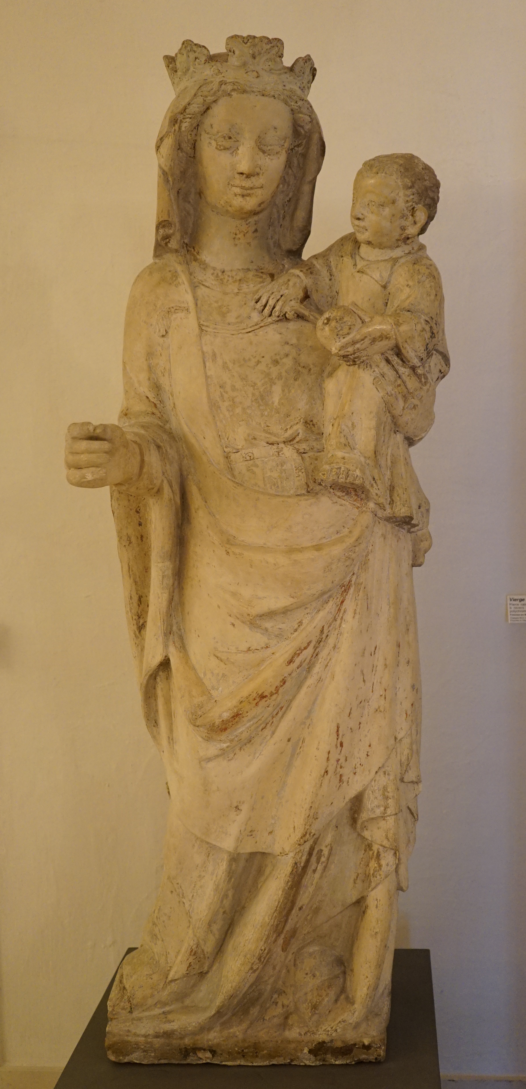 le musée de st-Mihiel.